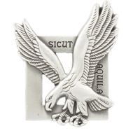 Qualification commando de l'Armée de l'Air.